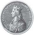 Adelaide di Susa (1020-1091), de facto margrave of Turin